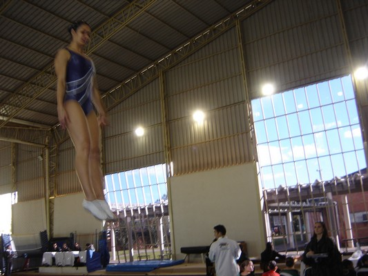 Ginastica de trampolim da ulbra